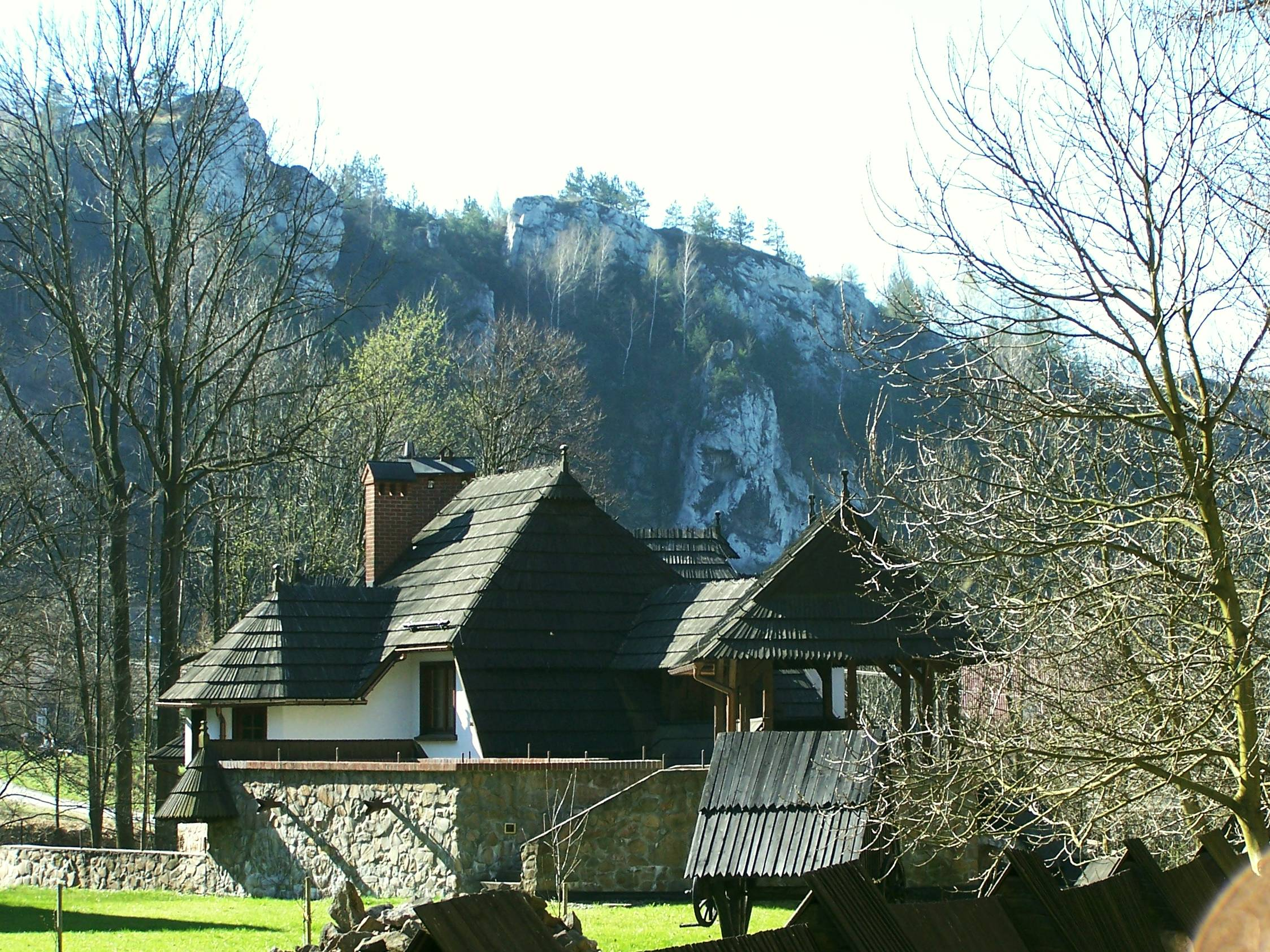 Dolina Będkowska (Park Krajobrazowy Dolinki Krakowskie)